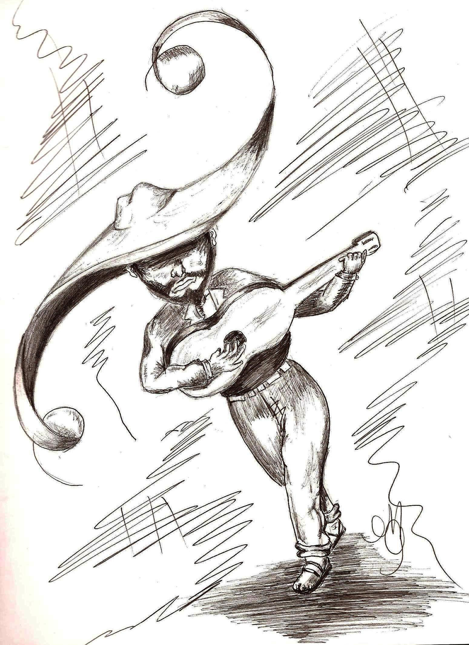 EL Sombrerón